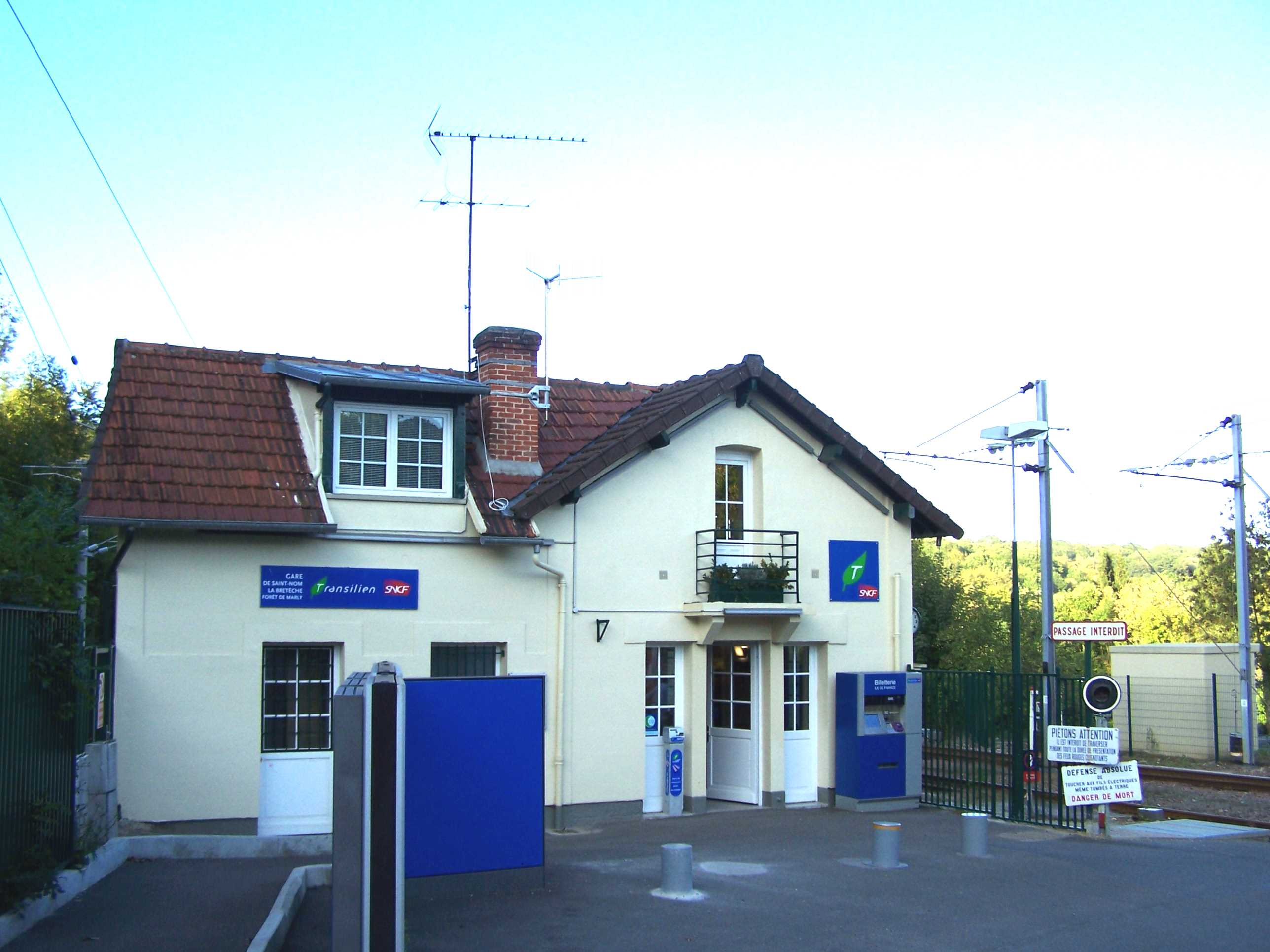 Gare de Saint-Nom-la-Bretèche à l'Étang-la-Ville (Yvelines, France)